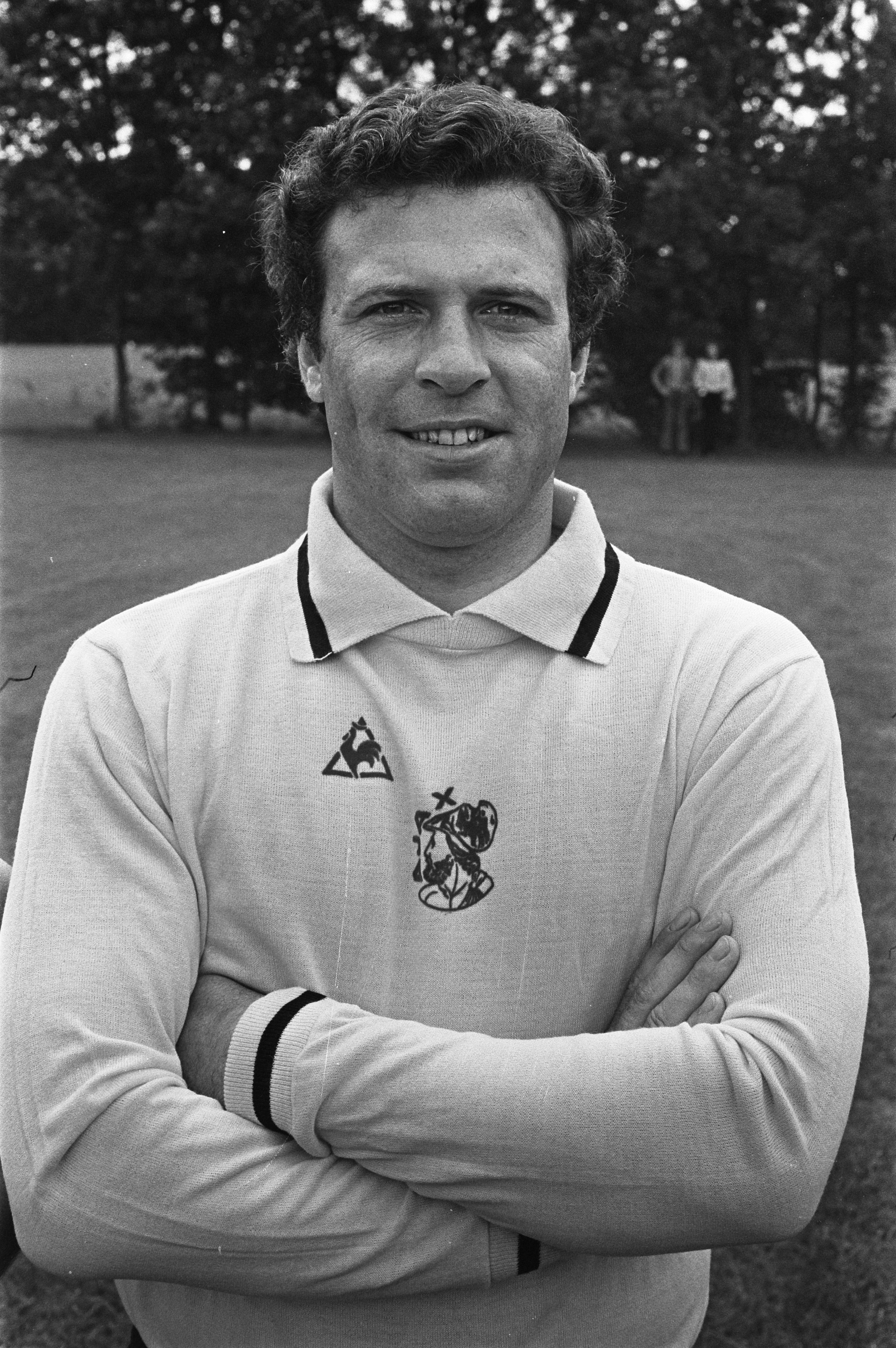 Collectie / Archief : Fotocollectie Anefo Reportage / Serie : Ajax presenteert de nieuwe selectie voor het aankomende voetbalseizoen 1975-1976 Beschrijving : Ajax keeper Heinz Stuy Datum : 15 juli 1975 Locatie : Amsterdam, Noord-Holland Trefwoorden : portretten, sport, voetbal Persoonsnaam : Stuy, Heinz Instellingsnaam : AJAX Fotograaf : Fotograaf Onbekend / Anefo Auteursrechthebbende : Nationaal Archief Materiaalsoort : Negatief (zwart/wit) Nummer archiefinventaris : bekijk toegang 2.24.01.05 Bestanddeelnummer : 928-0503